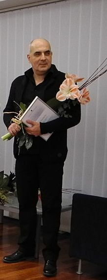 "Mandariinide" tegija Zaza Urušadze välisministeeriumi kultuuripreemia kätteandmisel.